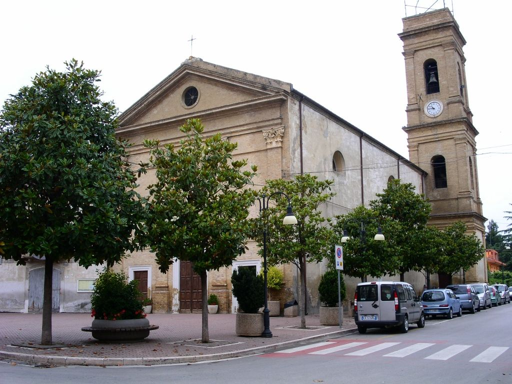 Piazza della Vittoria, nella frazione Villa Romagnoli. Mozzagrogna (CH), 3 giugno 2007. Foto scattata da me.